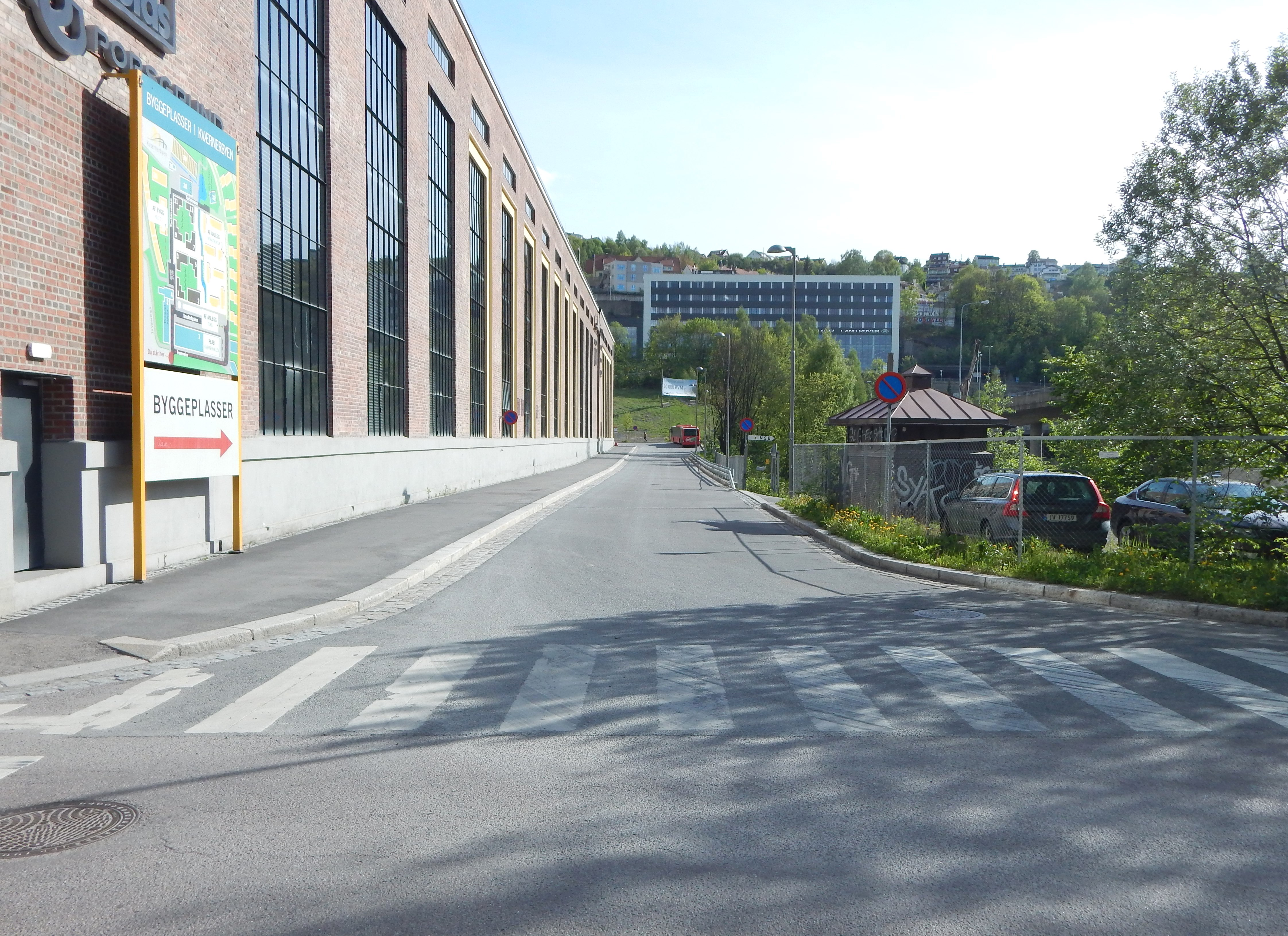 Freserveien på vestsiden av den gamle verkstedhallen i Kværnerbyen